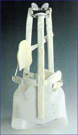 visibile la pelotta laterale di spinta